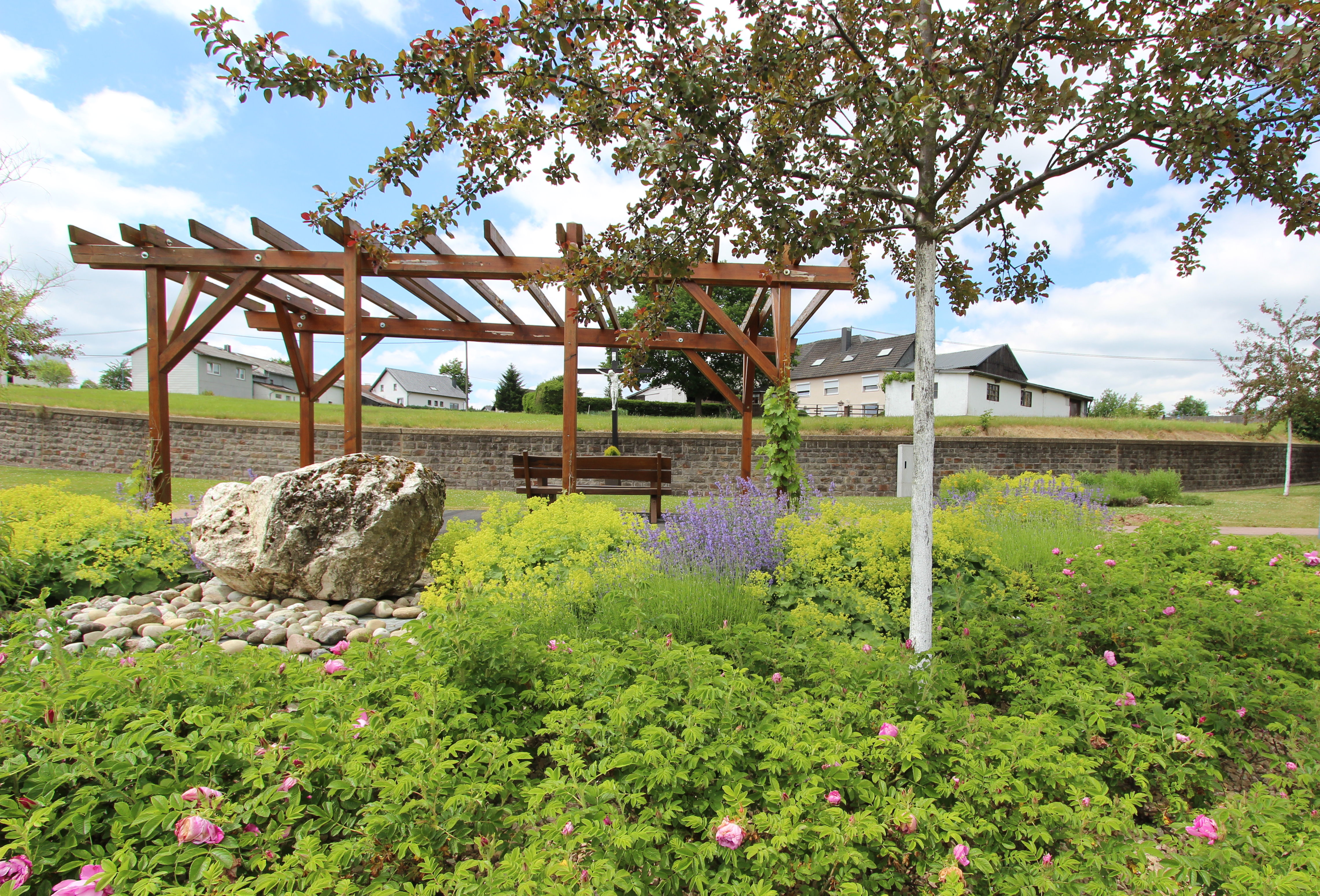 54611 Scheid, Ecke Hauptstraße/Ringstraße. Aufnahme von 2017.